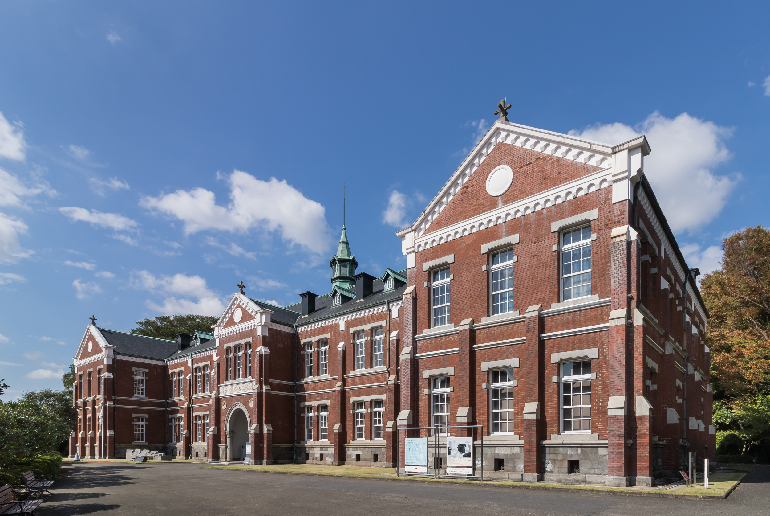 東京国立近代美術館工芸館、陸軍近衛師団司令部跡。